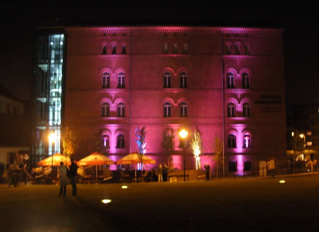 Czerwony Spichlerz (Bydgoszcz)